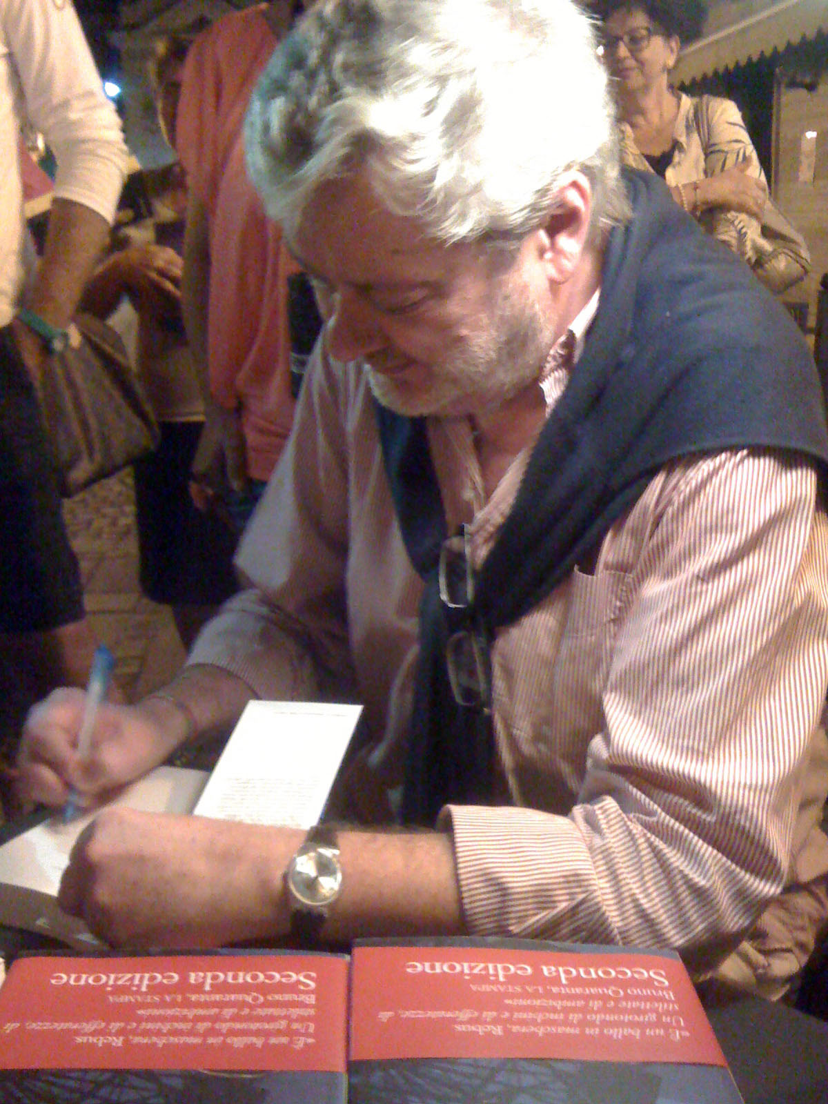 Scrittore, copywriter, sceneggiatore e regista